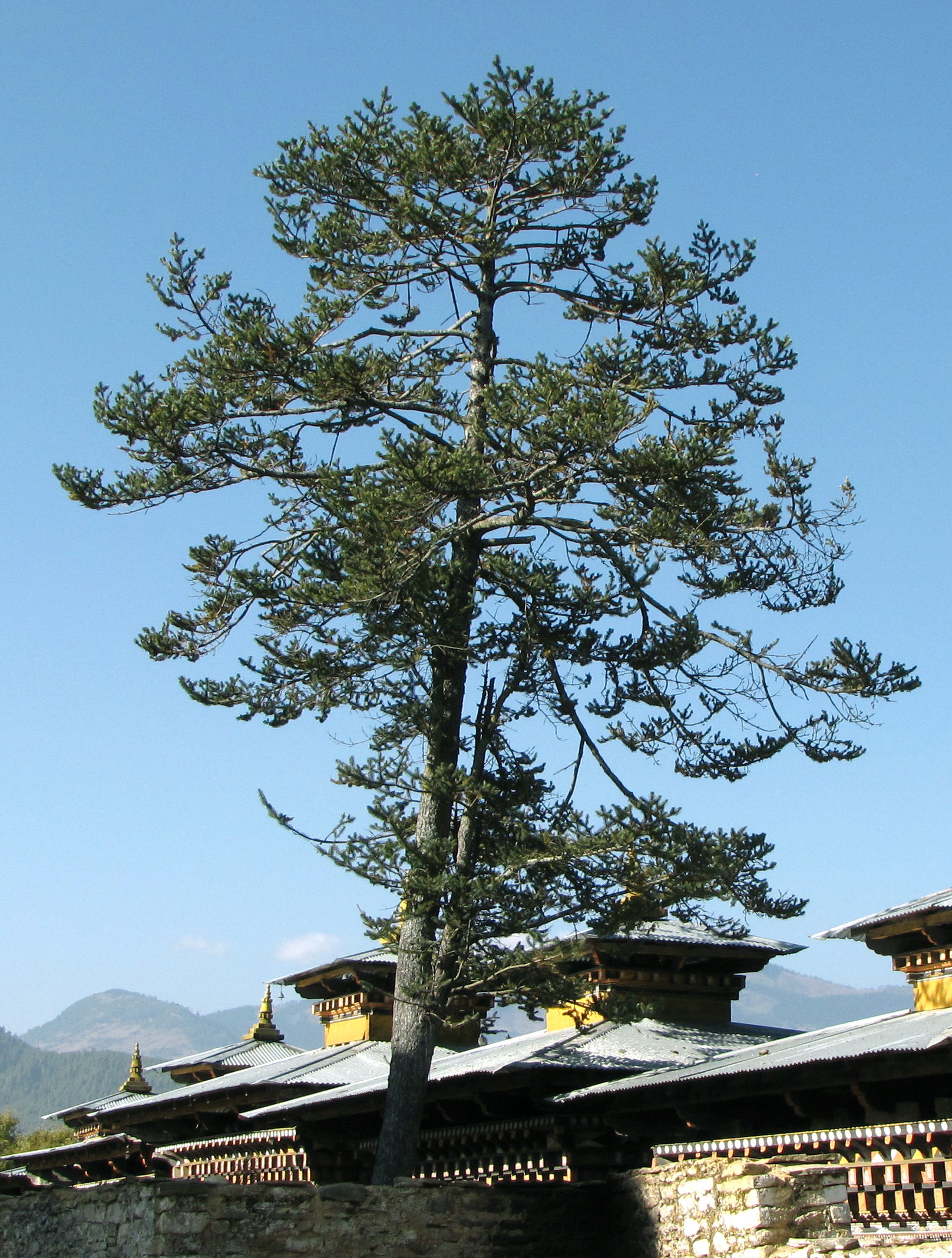 Abies densa, Wangdicholing Palace, Bumthang, Bhutan.